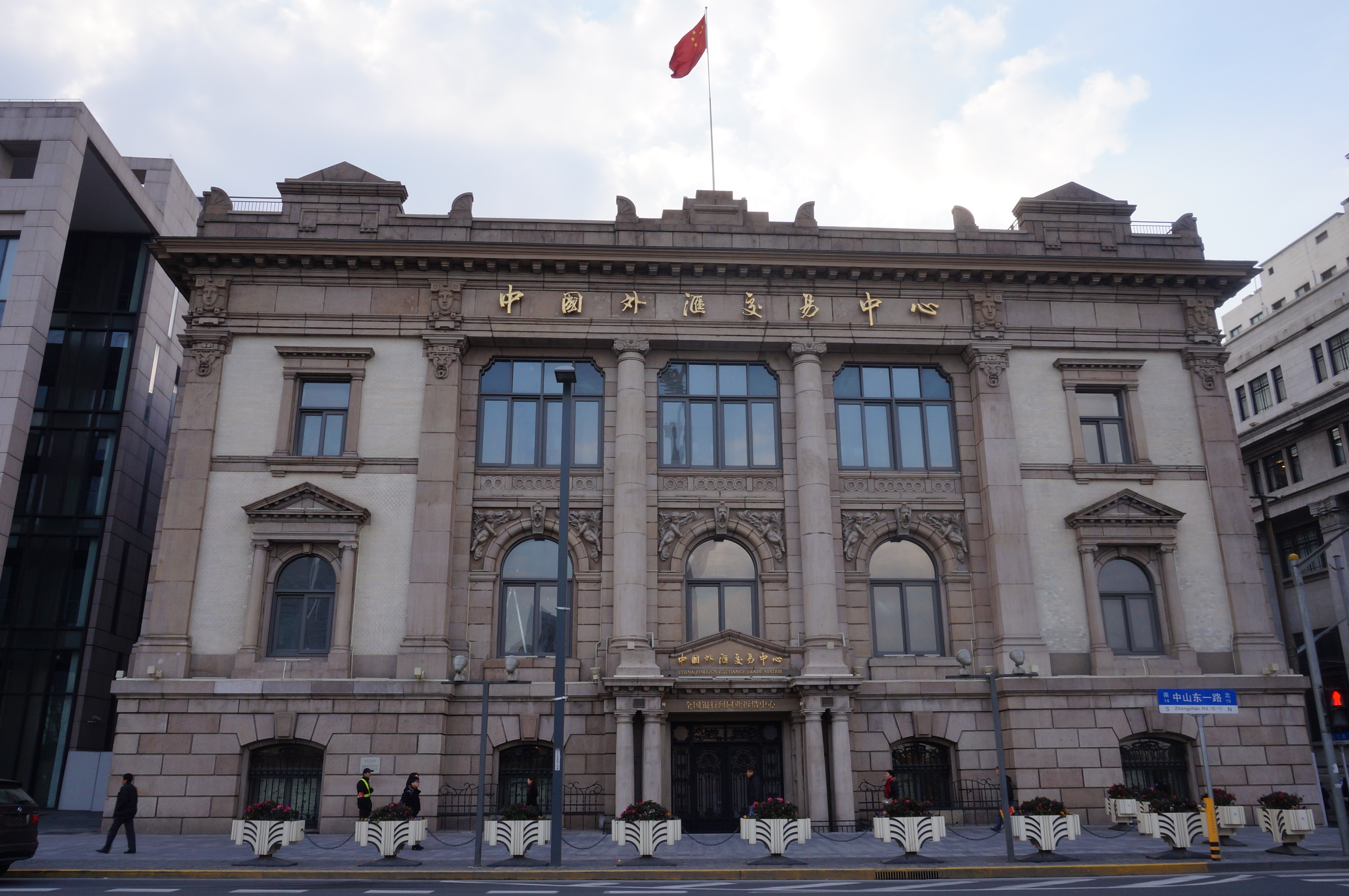 外滩华俄道胜银行大楼